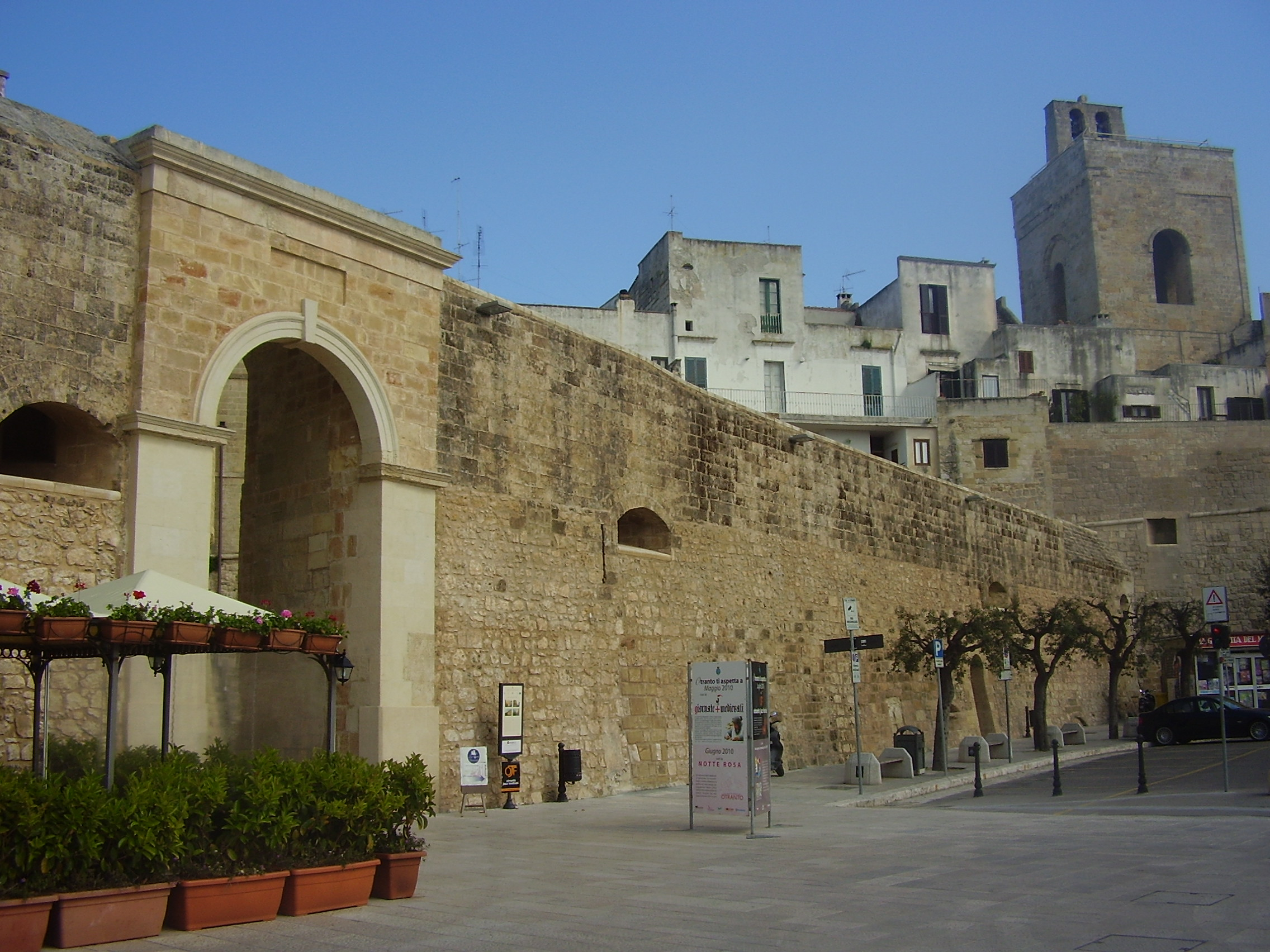 Otranto Porta Terra